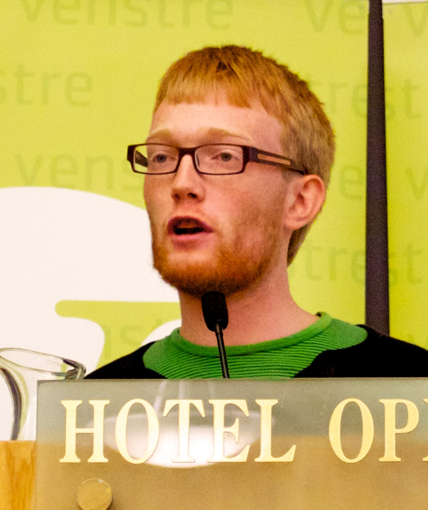 Per Magnus Sandsmark